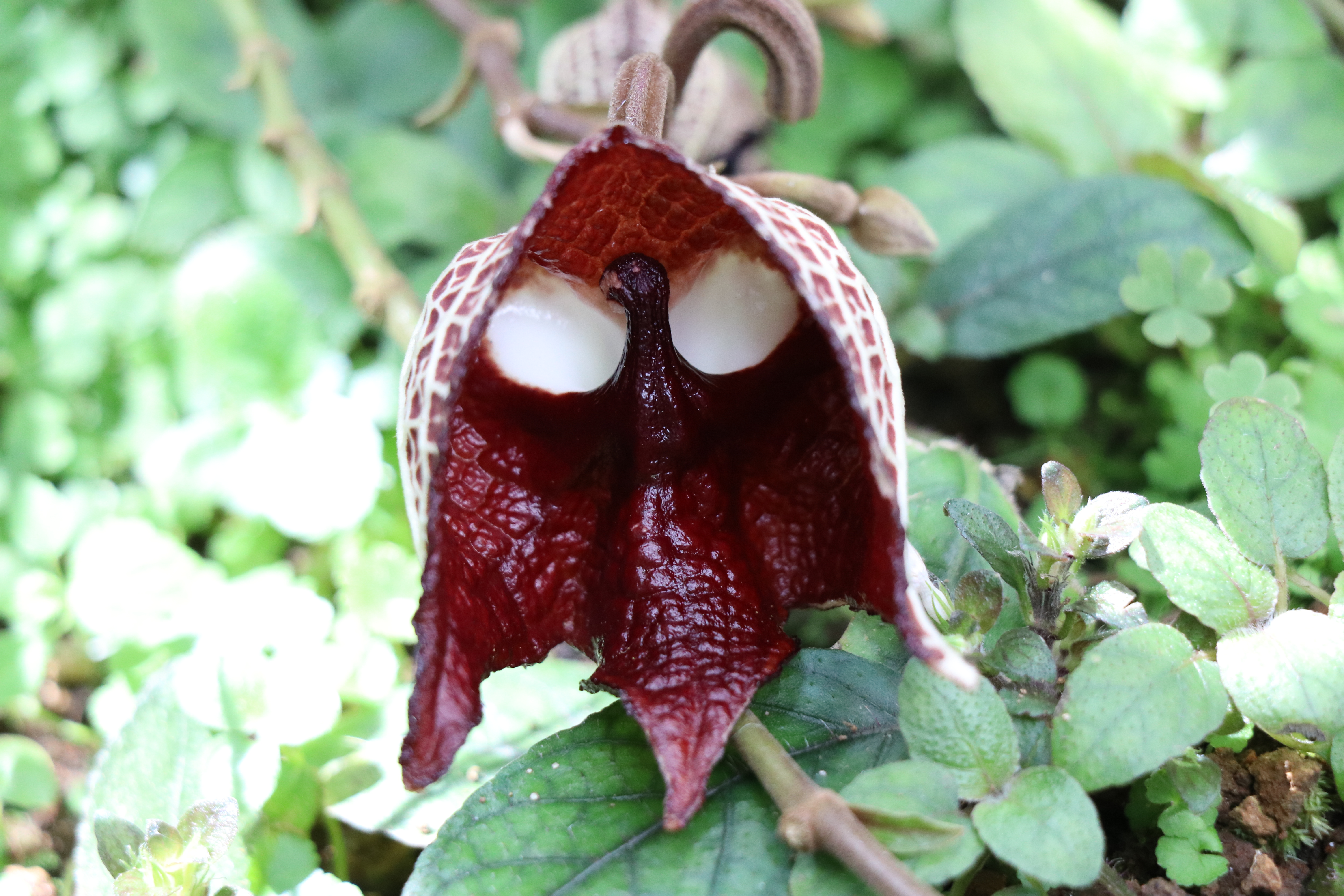 神代植物公園の大温室に咲くアリストロキア・ サルバドレンシス